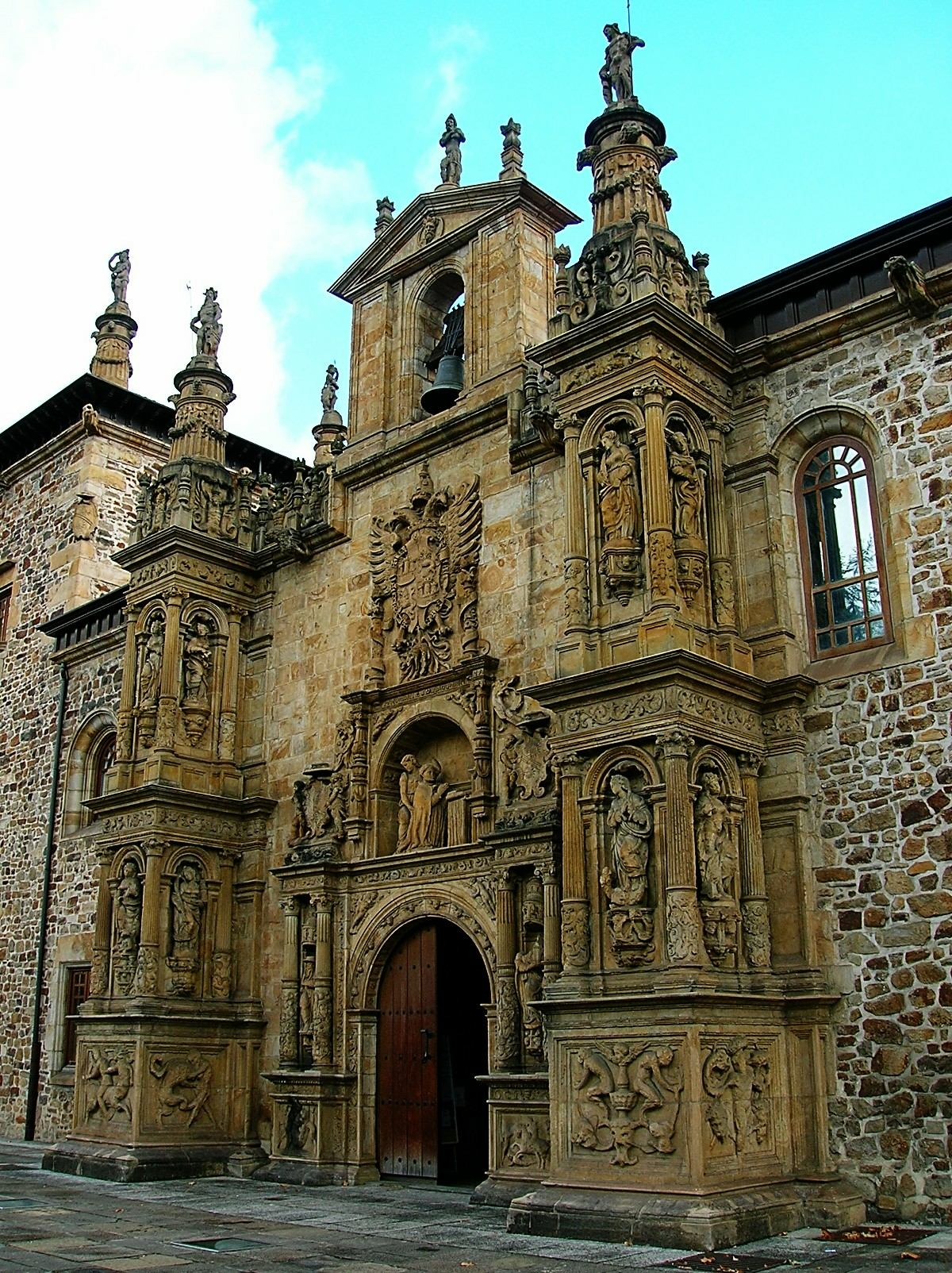 Universidad Sancti Spiritus, Oñate (Guipúzcoa)